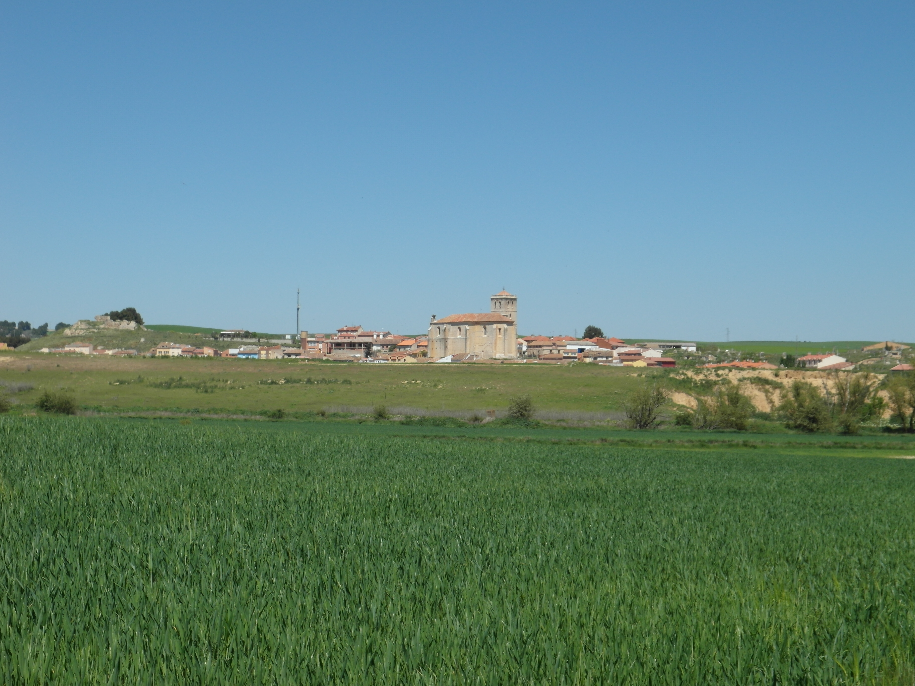 Mucientes, Valladolid.